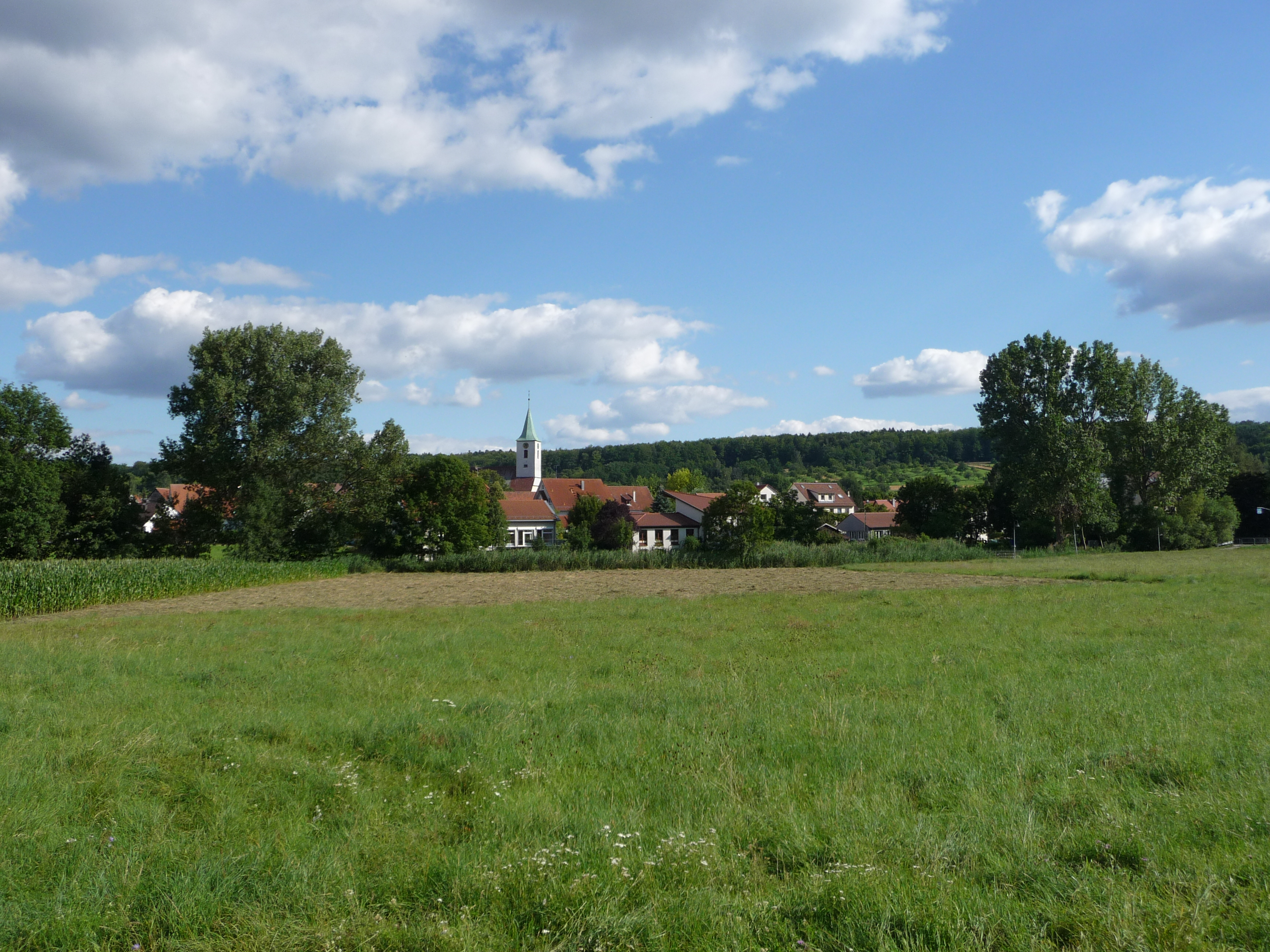 Blick von Norden auf die Ortsmitte von Warmbronn